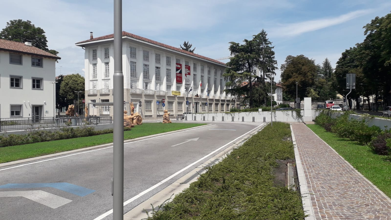 Il liceo artistico Sello, in piazza Primo Maggio ad Udine